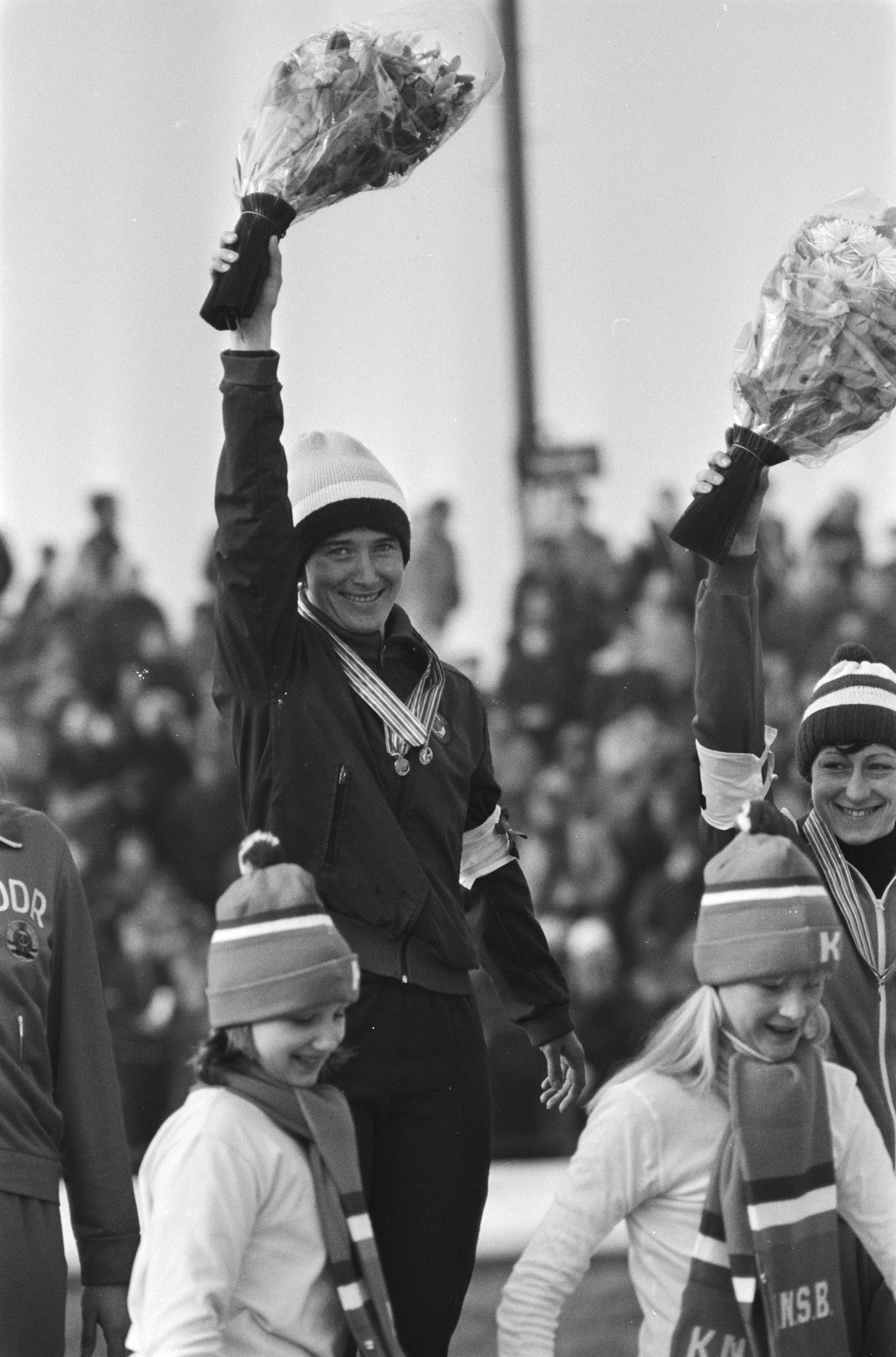 Collectie / Archief : Fotocollectie Anefo Reportage / Serie : [ onbekend ] Beschrijving : WK Sprint schaatsen in Alkmaar. Petruseva met medailles en bloemen Datum : 7 februari 1982 Locatie : Alkmaar, Noord-Holland Trefwoorden : BLOEMEN, MEDAILLES, SCHAATSEN, sport Fotograaf : Croes, Rob C. / Anefo Auteursrechthebbende : Nationaal Archief Materiaalsoort : Negatief (zwart/wit) Nummer archiefinventaris : bekijk toegang 2.24.01.05 Bestanddeelnummer : 931-9595